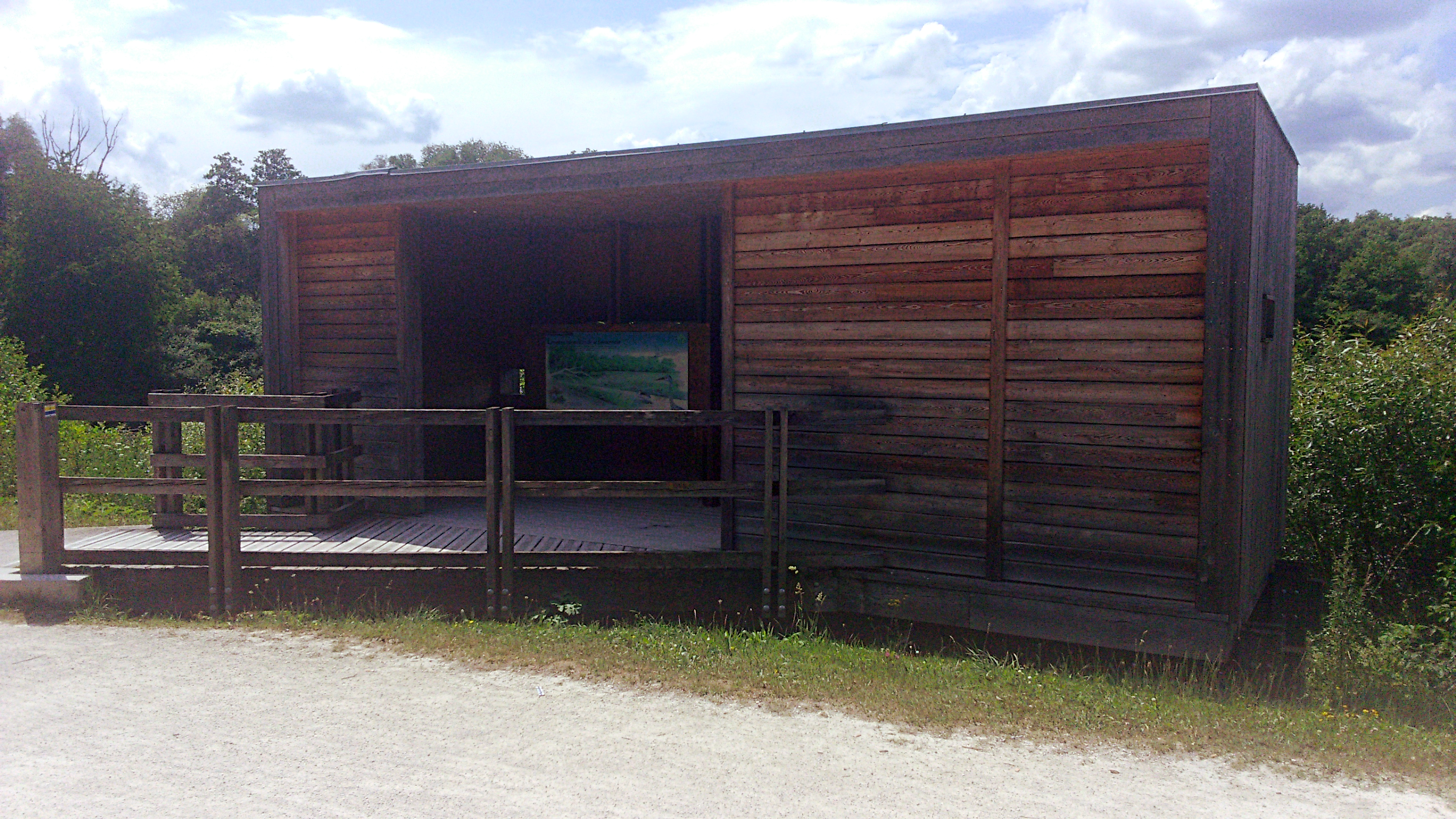 Observatoire en bordure de la RNR de la basse vallée de la savoureuse, Brignhard, Doubs, France